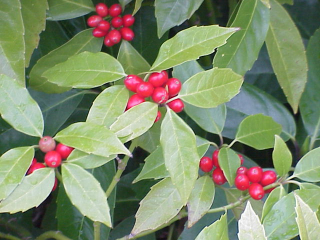 Species: Aucuba japonica Family: Cornaceae Image No. 3